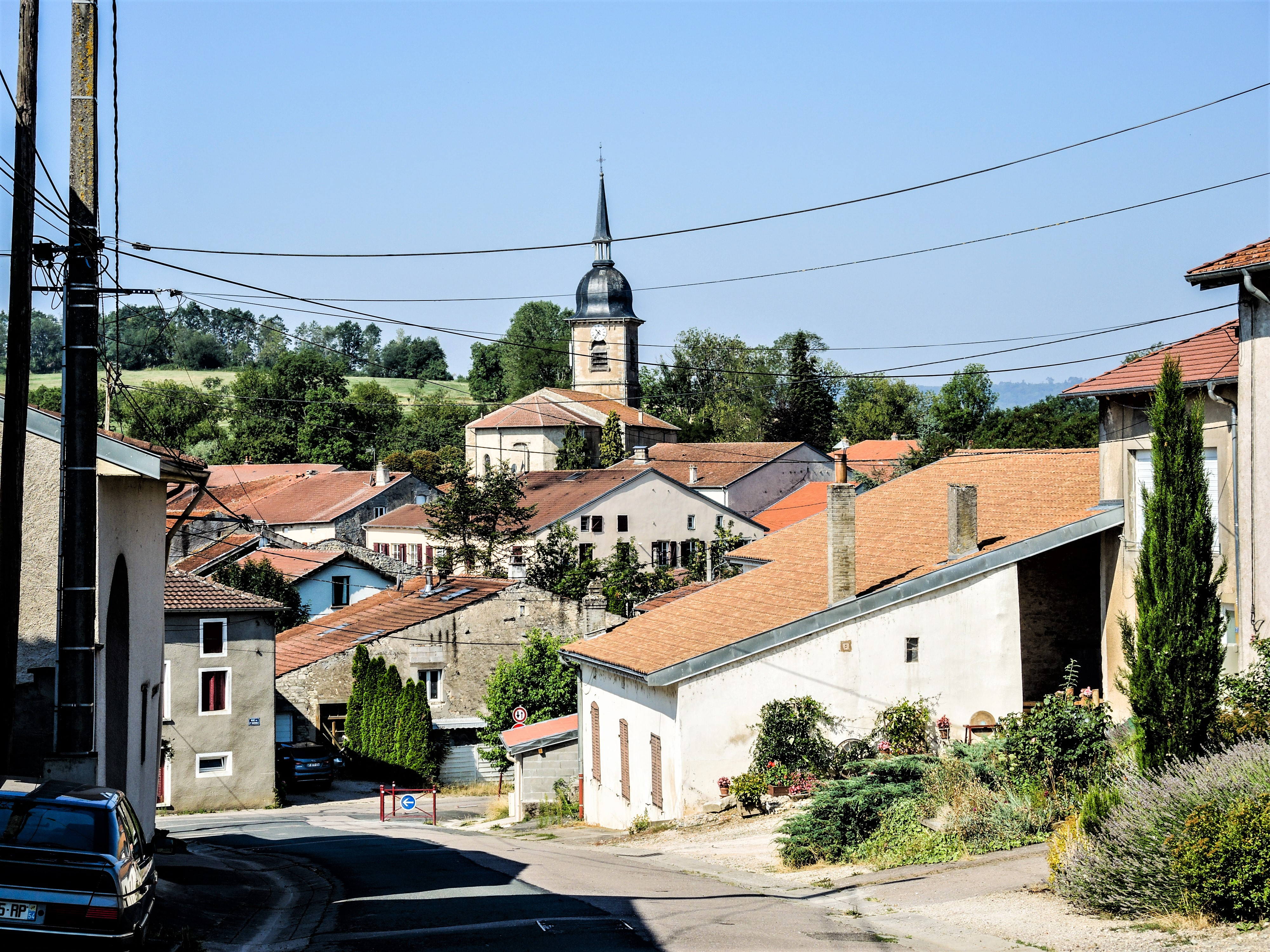 Centre du village et clocher de Xirocourt. Meurthe-et-Moselle